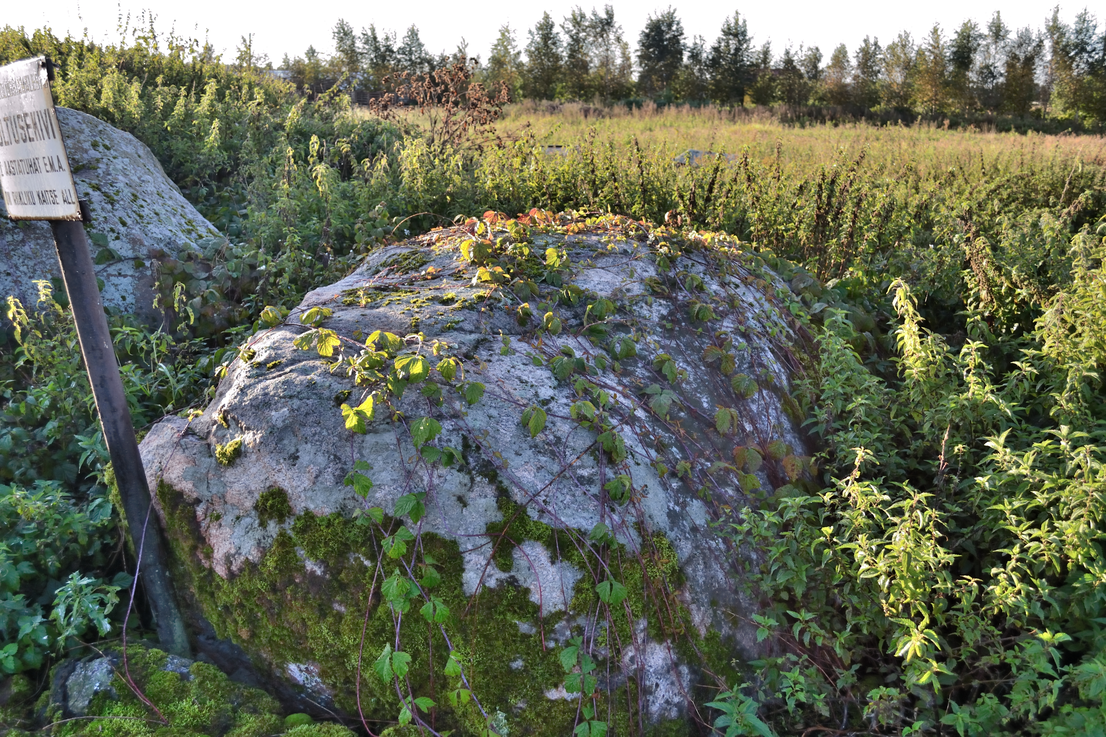 Kultusekivi, Saue vald, Alliku küla Uuetalu